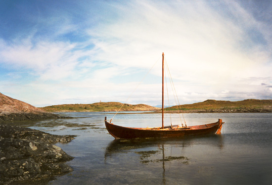 Geitbåt-seksæringen «Todalsgeita» fortøydd i ein Smøla-holme. (Foto: Annar Thinn, Kystlaget Geitbåtens Venner)